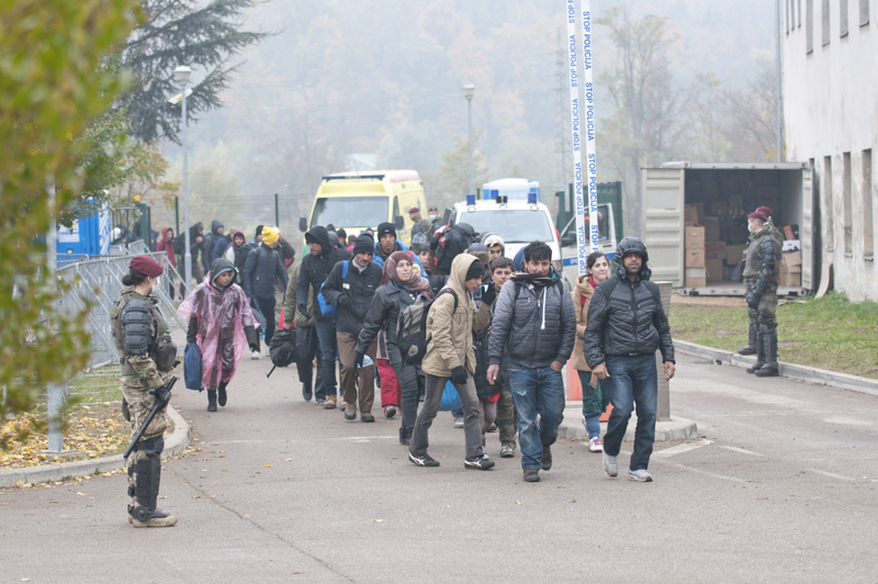 Ko stopijo skupaj vojaki, policisti, civilna zašita in nevladne organizacije.